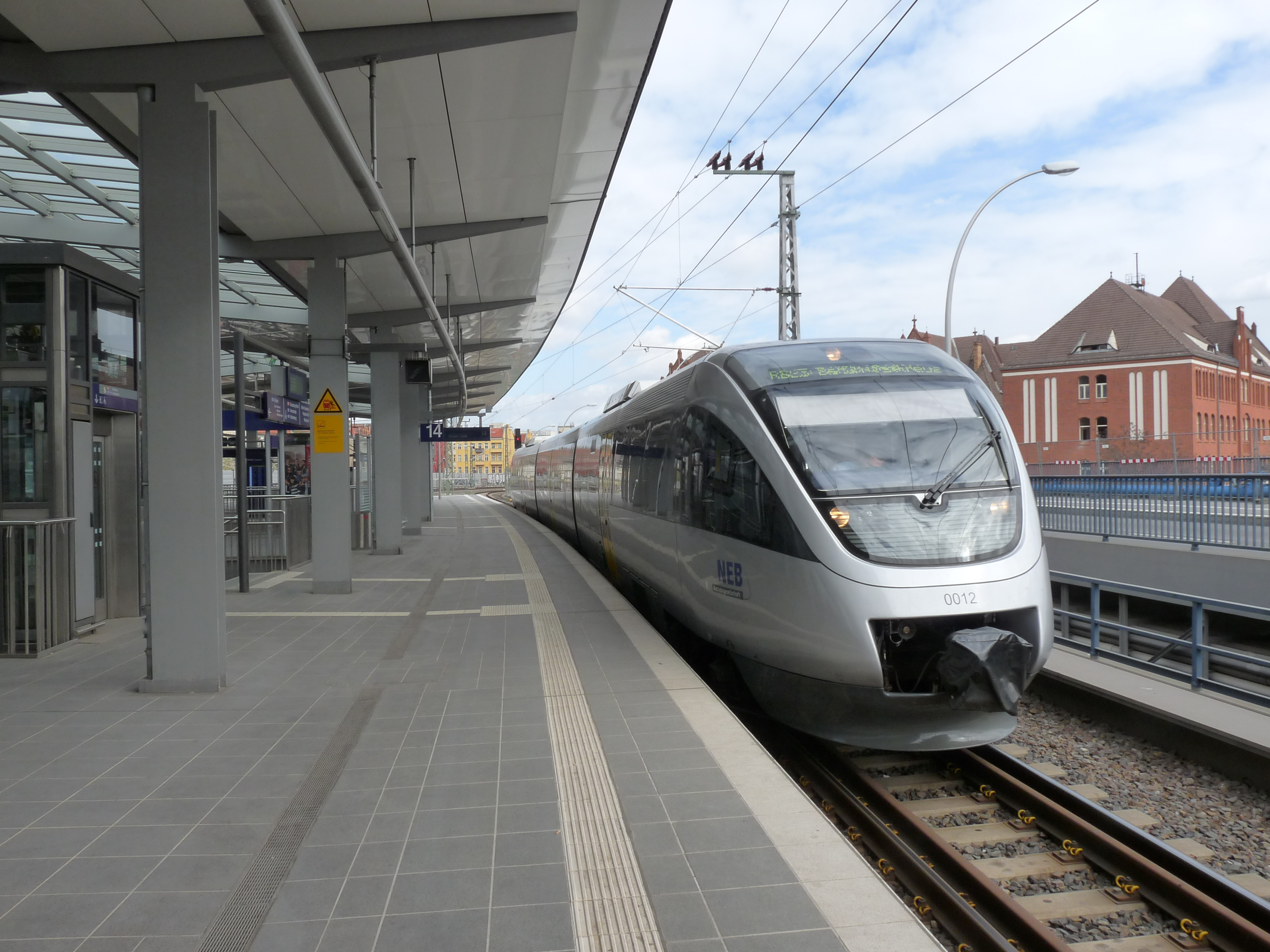 Het regionaalspoorplatform met dieseltreinstel